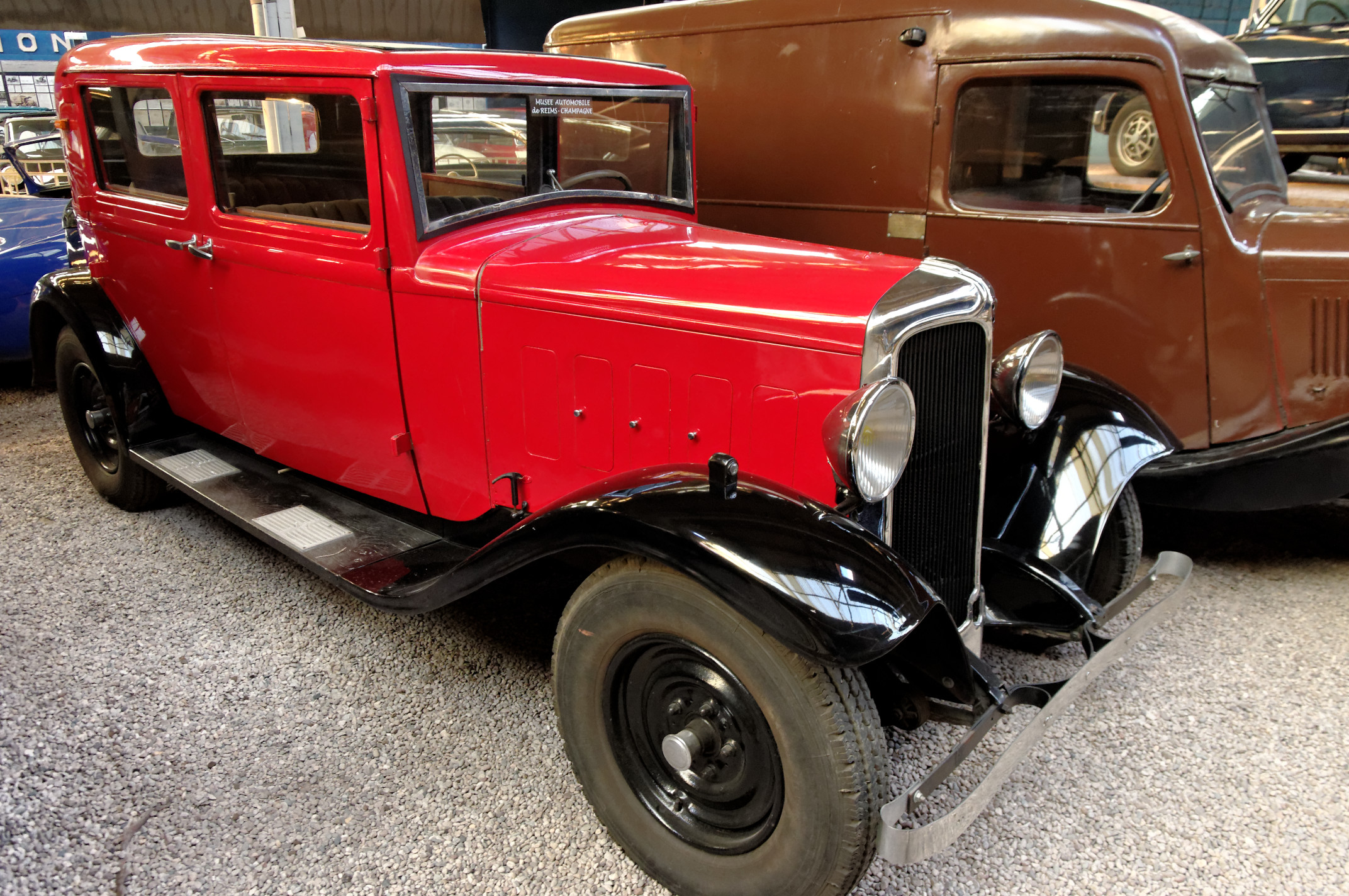 Berliet 944 (1934), Berline, 4 cyl. en ligne à soupapes culbutées, 1600 cm3, 40 ch., vitesse max. 95 km/hCountry of origin: France (Musée Automobile Reims Champagne, Reims, Marne, France)